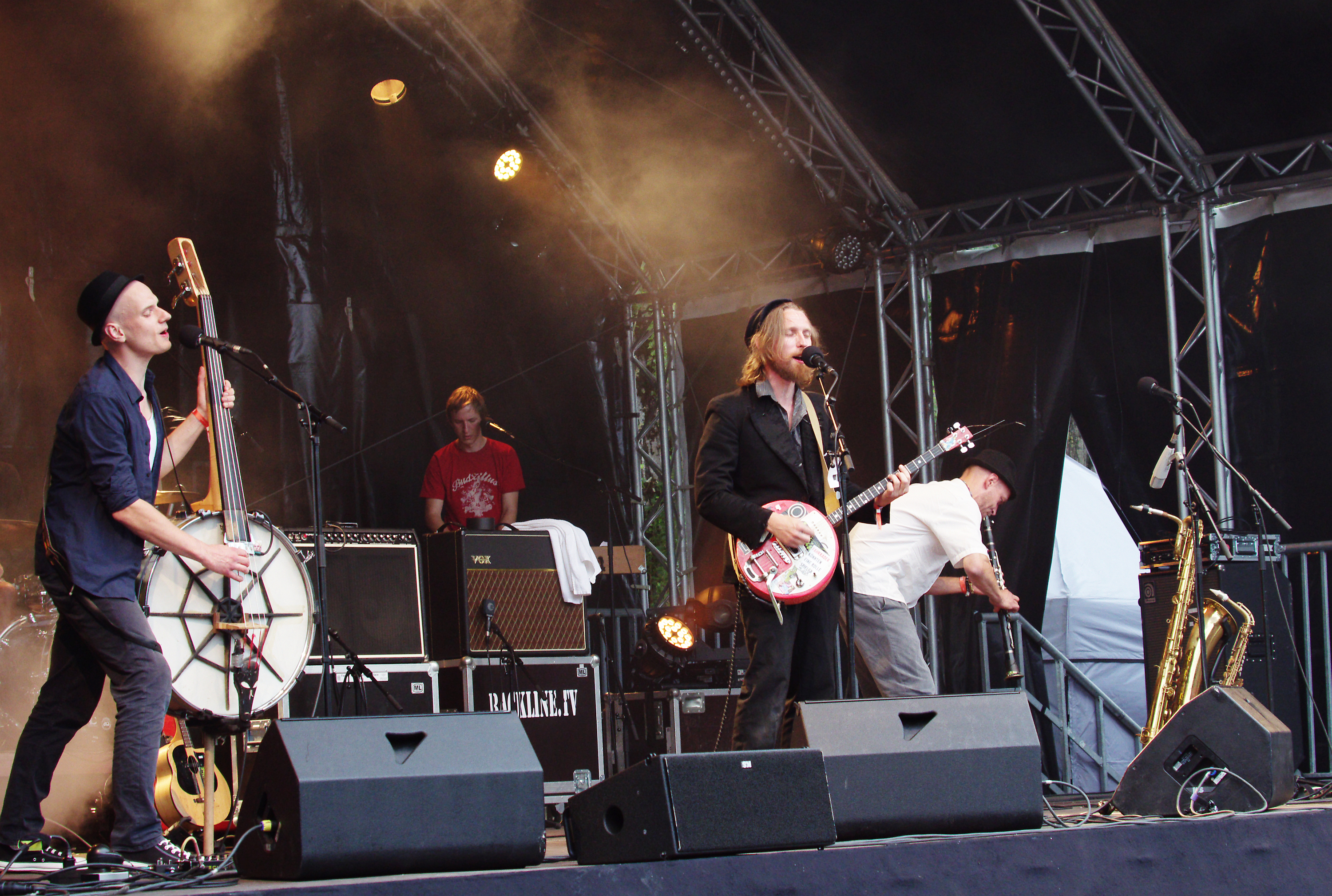 BudZillus beim Traumzeit Festival 2013 in Duisburg. Besetzung: ROBERT KONDOROSI - vocals, guitar, banjo, KRISTIAN ZEPPLIN - double bass banjo, STEFAN WOLFF - organ, recorder, harmonica, THOMAS PRESTIN - saxophone, clarinet, Domenico Dobrovolskis - drums